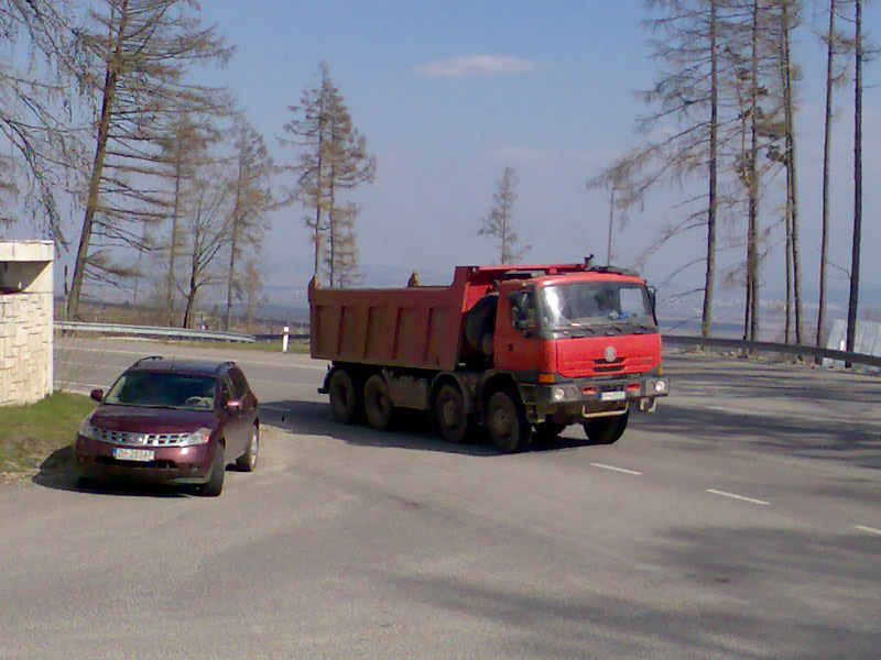 Tatra TerrNo1 8x8, Vyšné Hágy